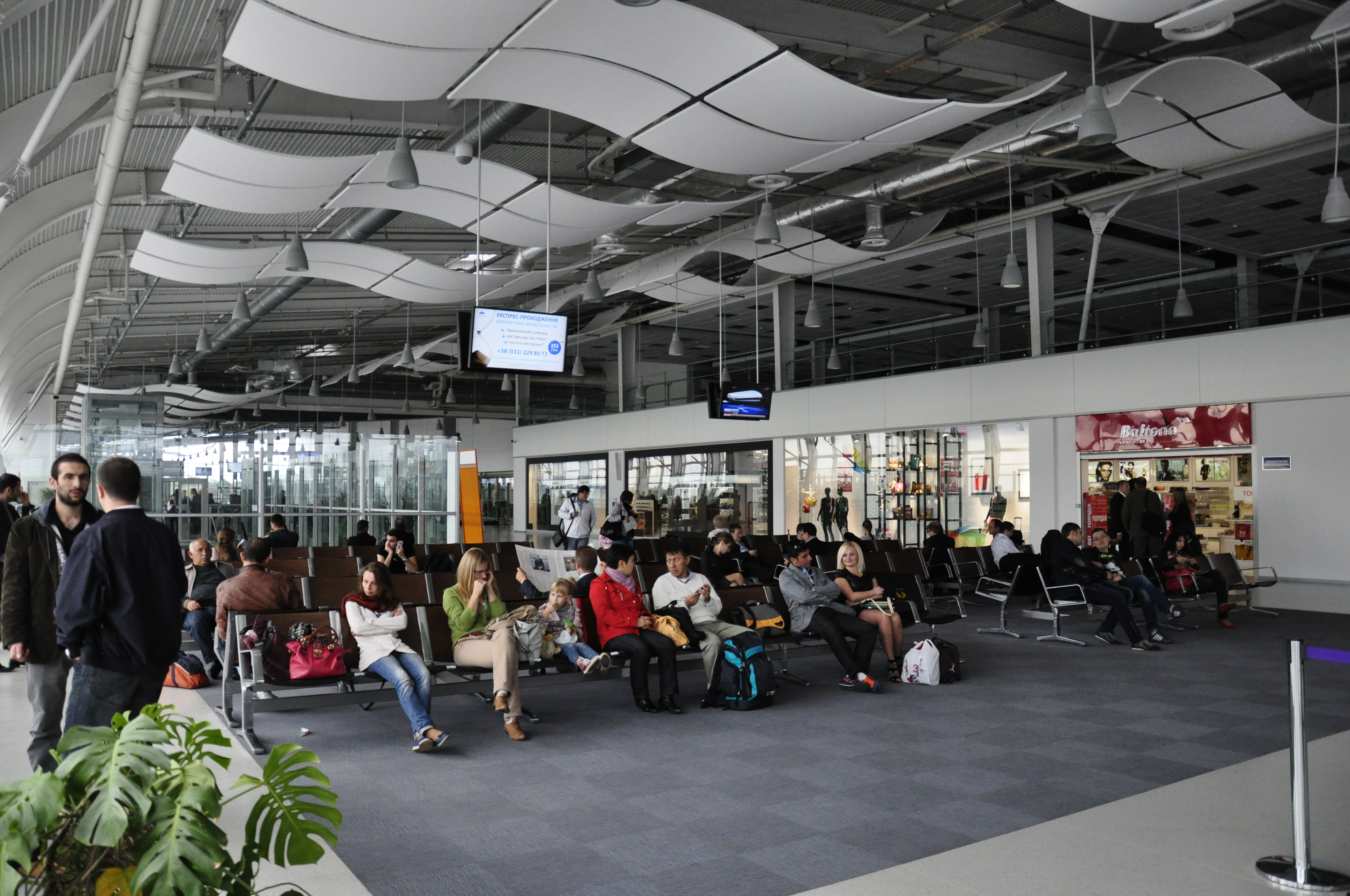 зона очікування ukli